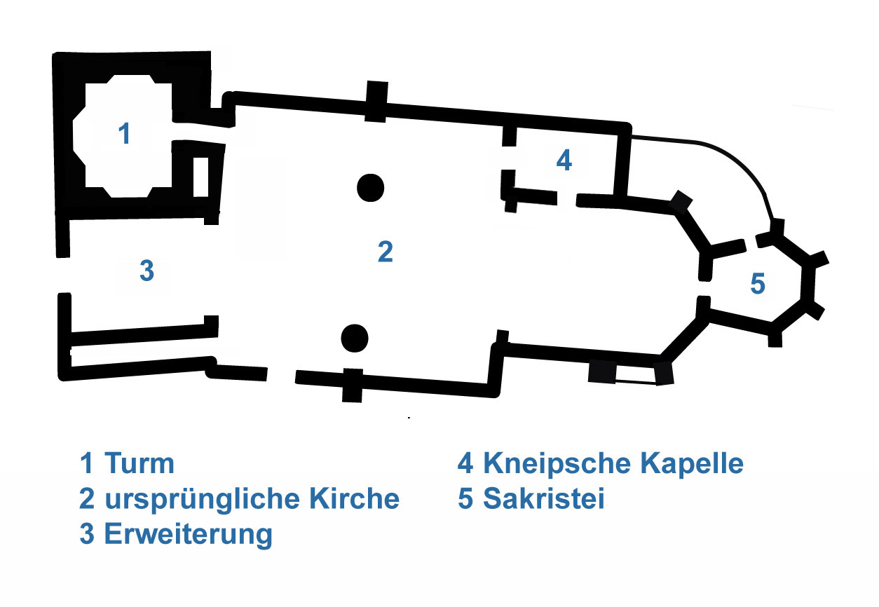 Bernkastel-Kues (Mosel), St.Michael, Grundriss